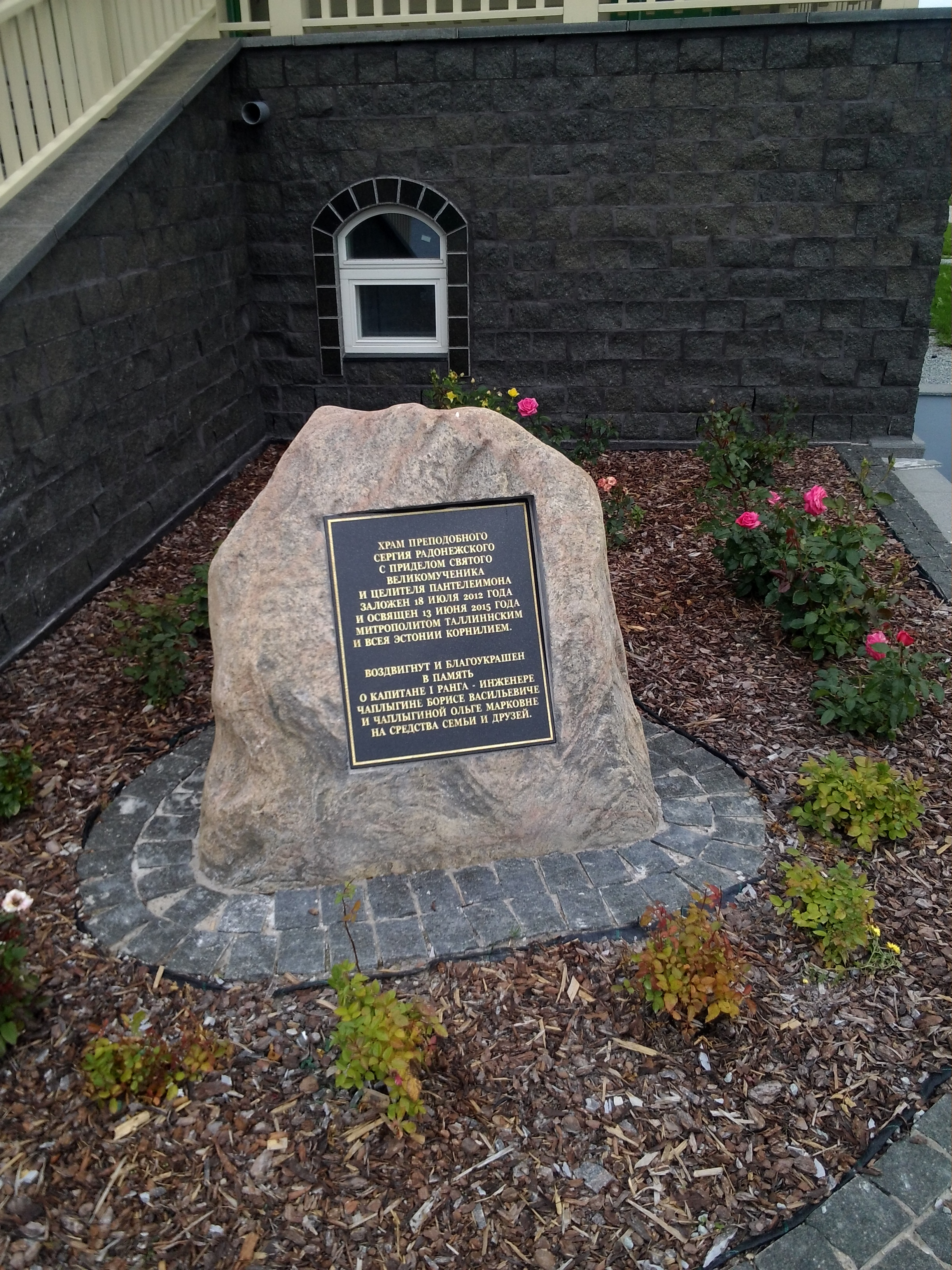 Православний храм у Палдіскі